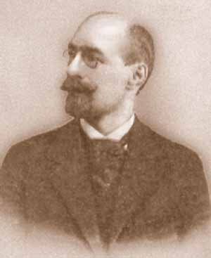 Либрович Сигизмунд Феликсович (1855-1918) - русский писатель